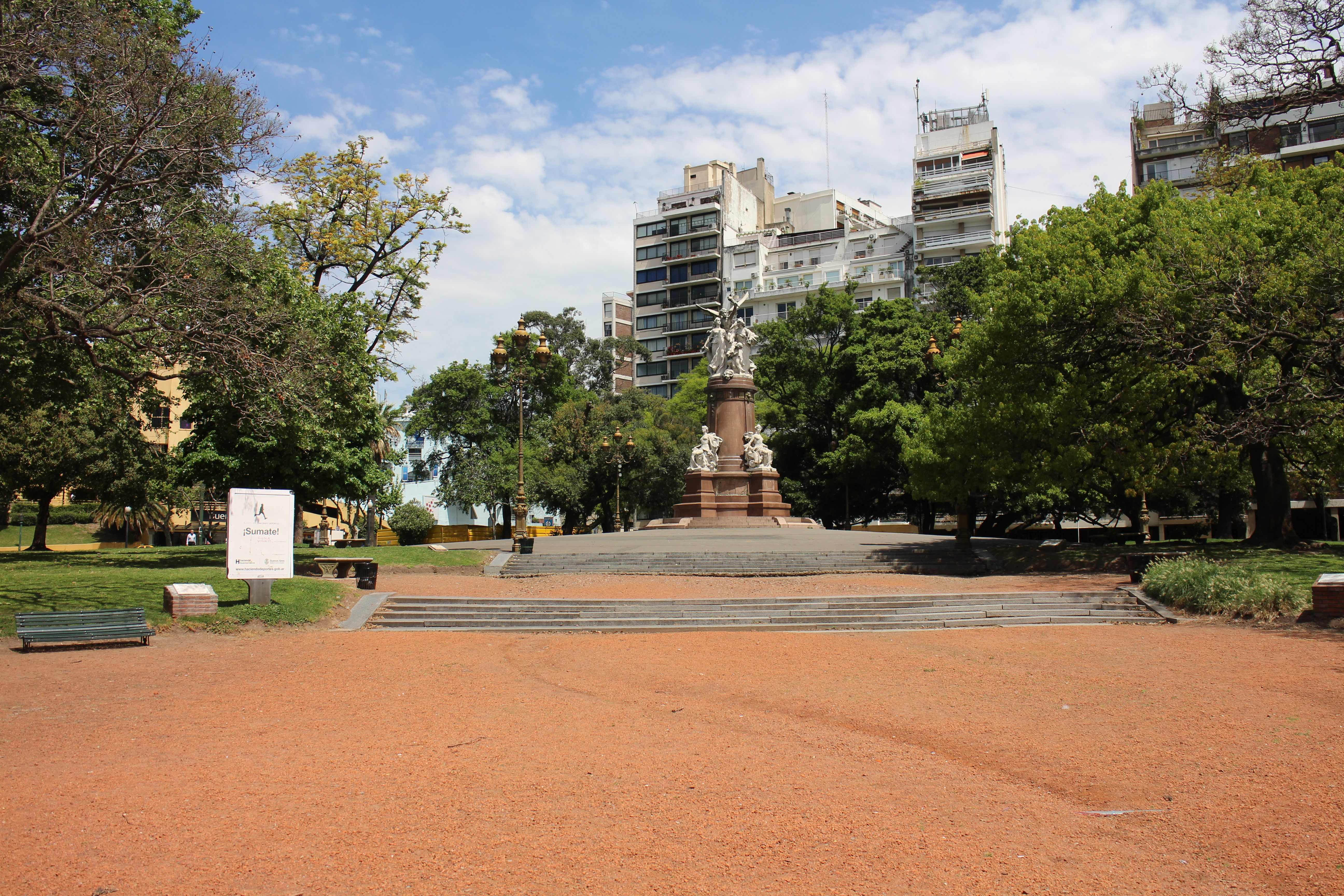 Plaza Francia, Ciudad Autónoma de Buenos Aires.